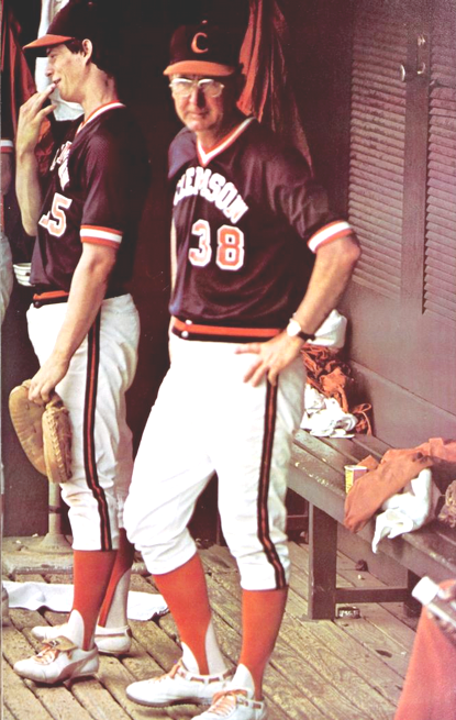 Bill Wilhelm